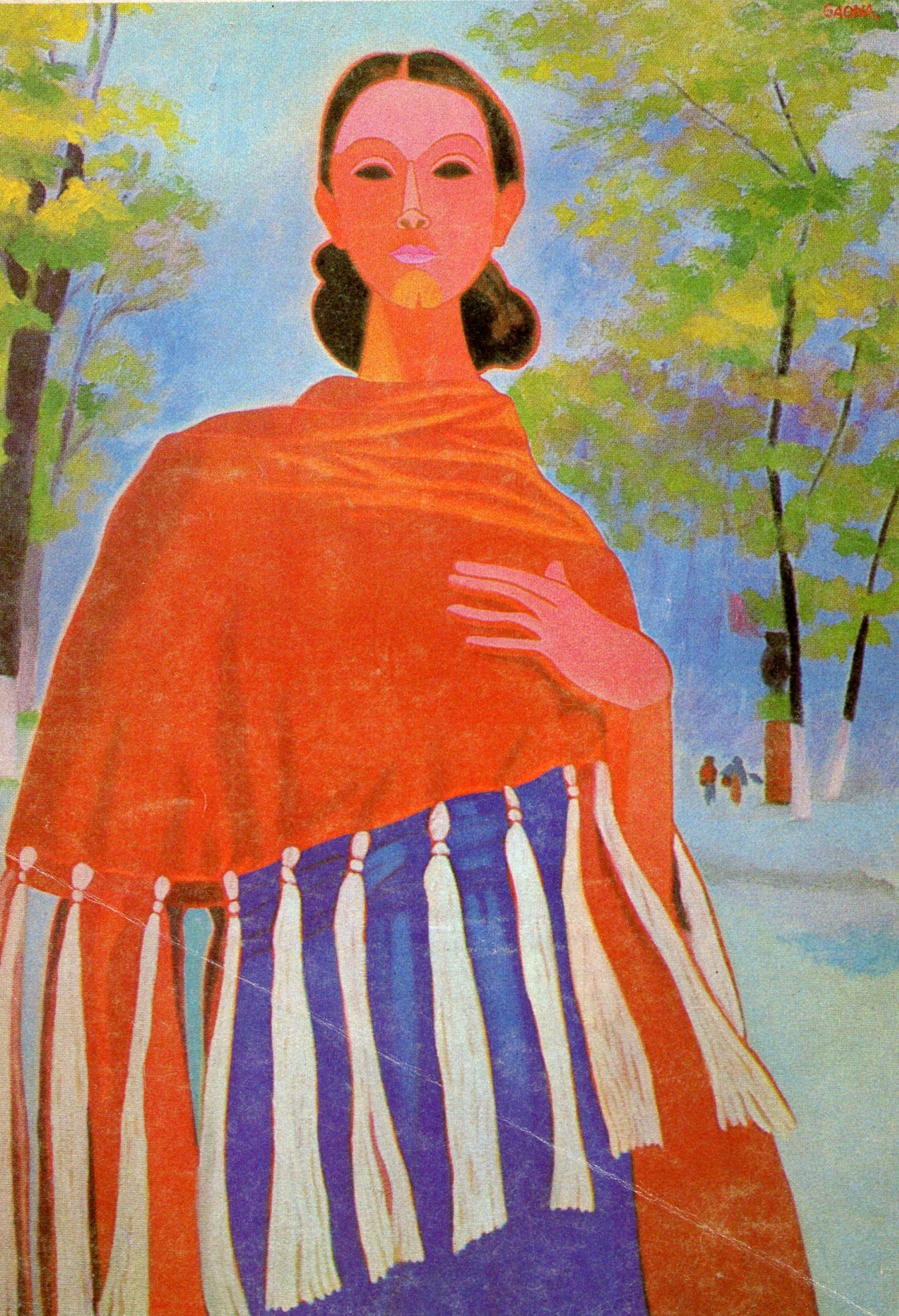 "Invierno en la ciudad" by José Julio Gaona Adame